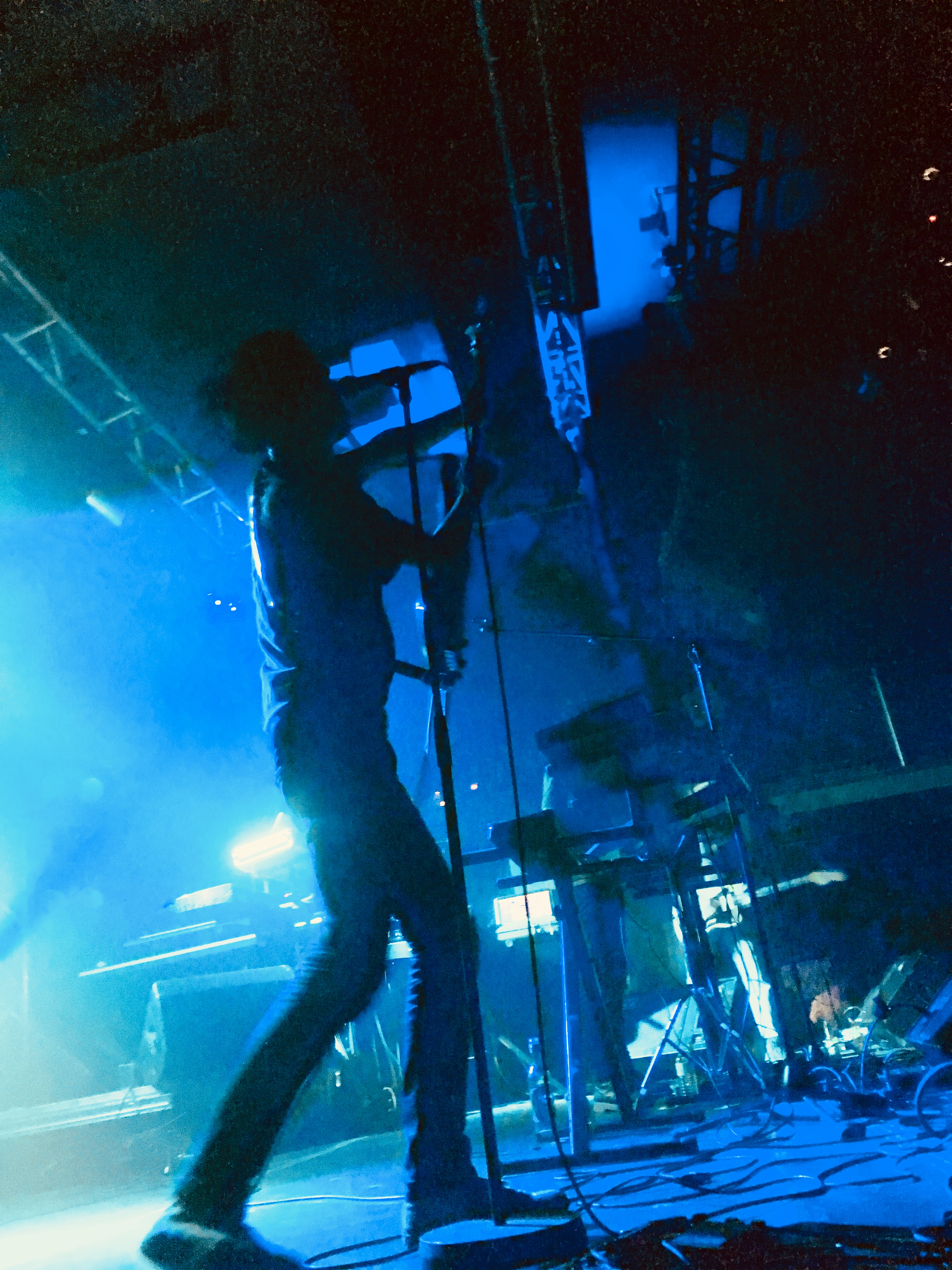 Rendez Vous en Concert